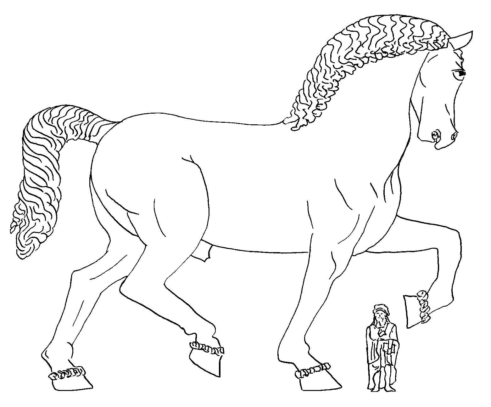 Le Cheval de Léonard - Comparaison de taille entre Léonard de Vinci et sa statue.